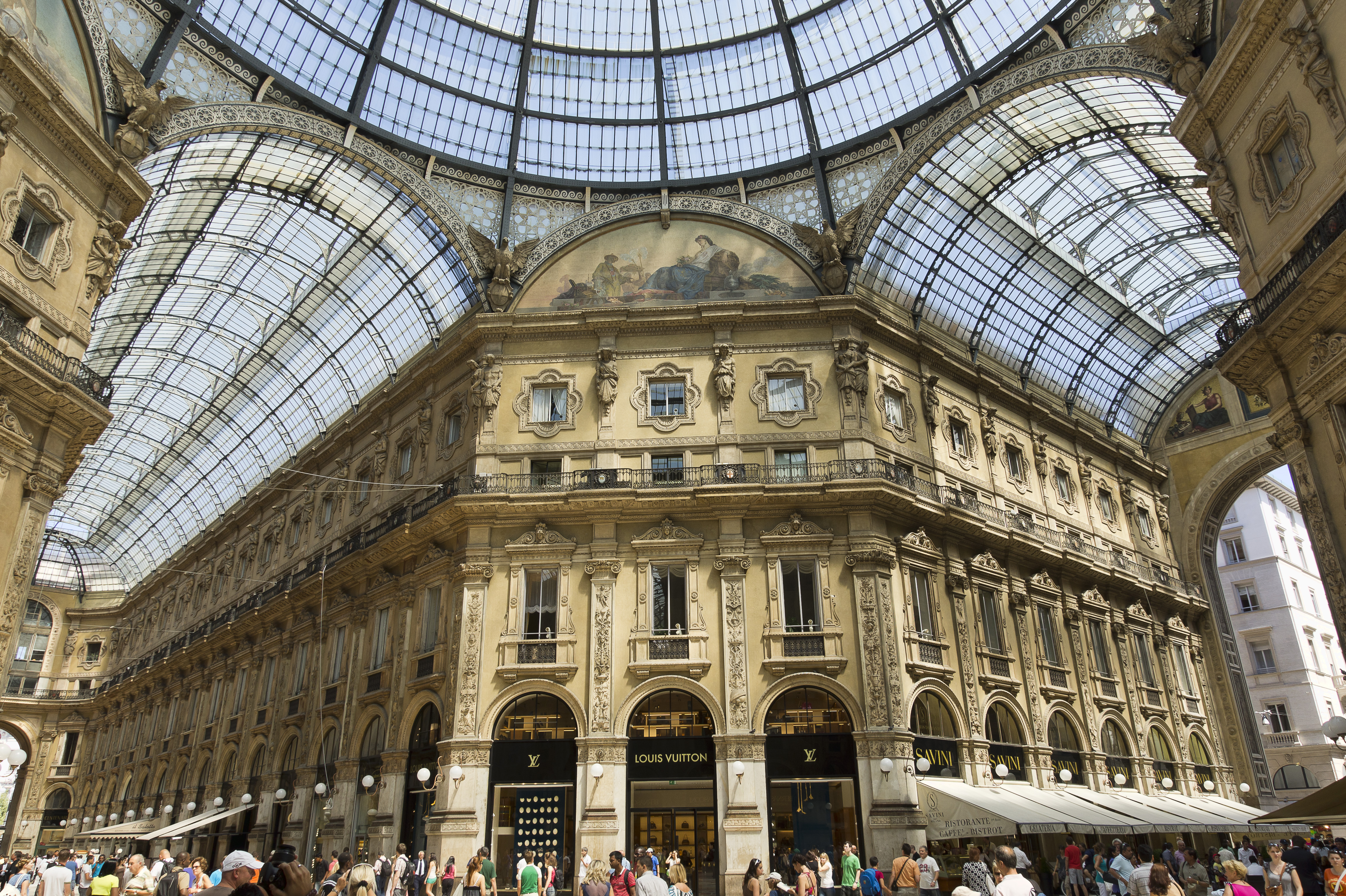 Galerie Vittorio Emanuele II